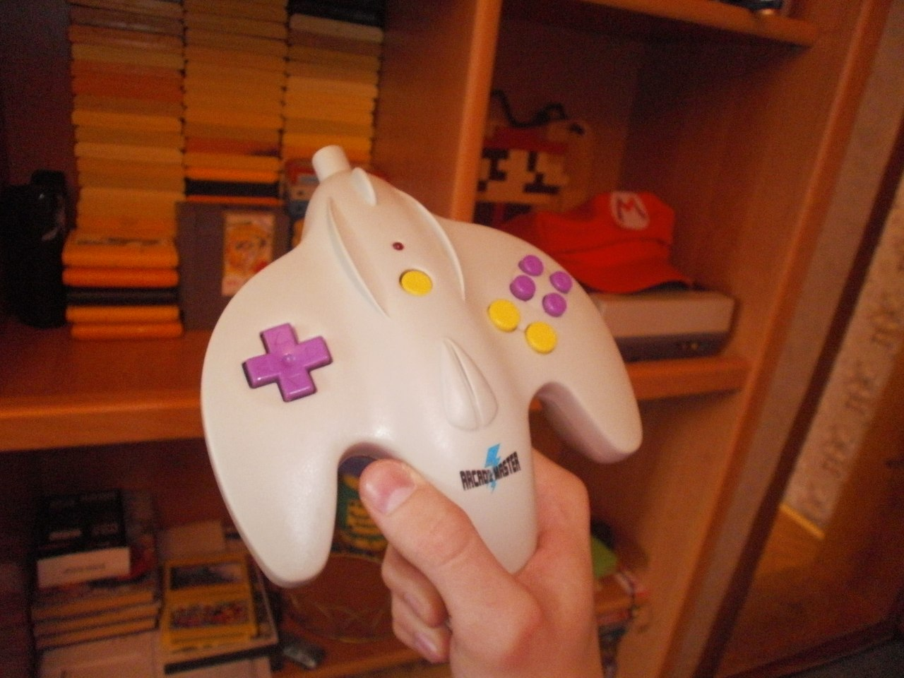 Фаміклон-джойстик